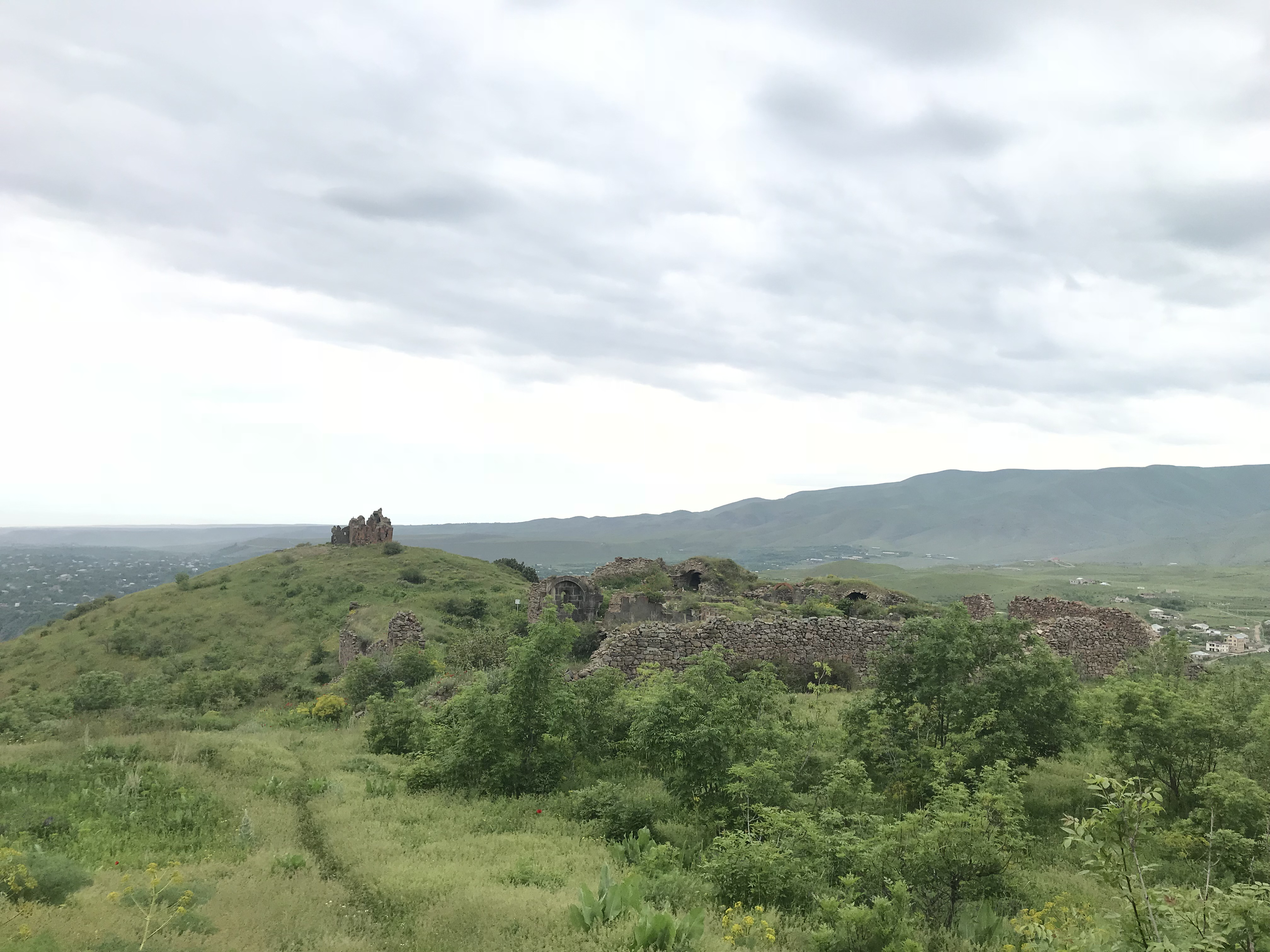 Խոսրովի անտառ